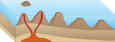 Denizaltı Guyot